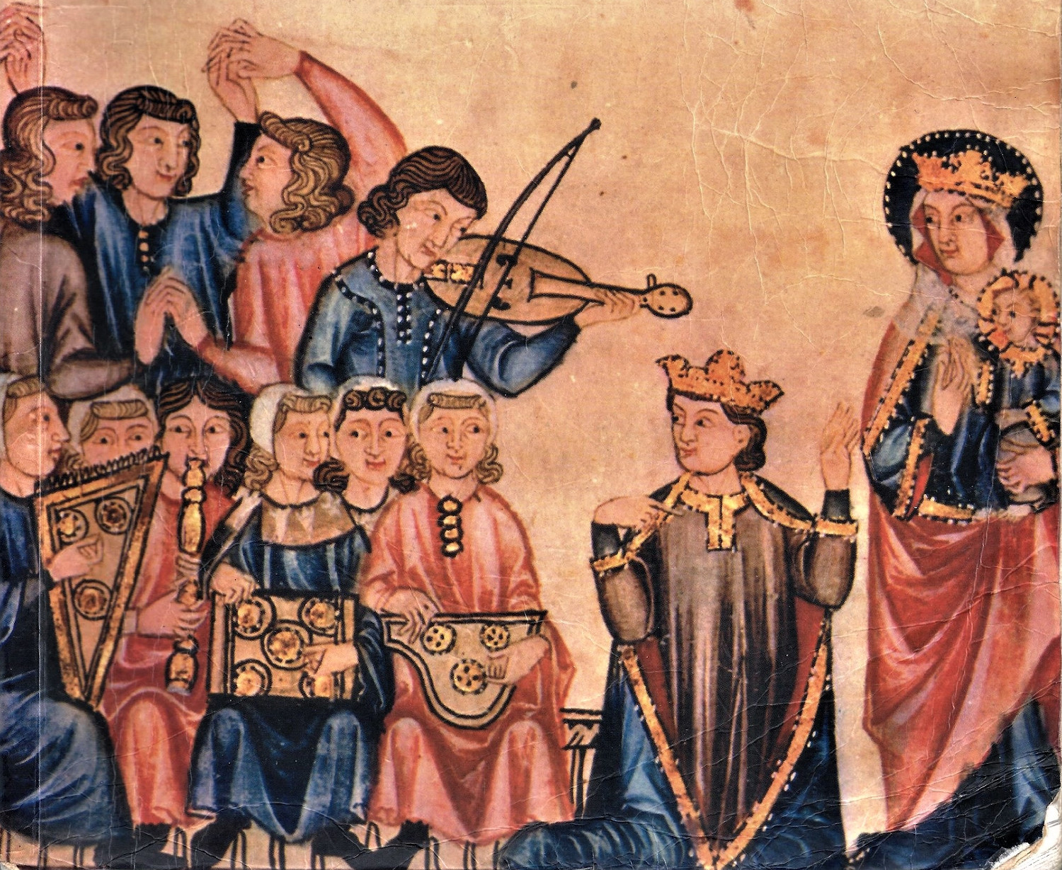 Cantigas de Santa María